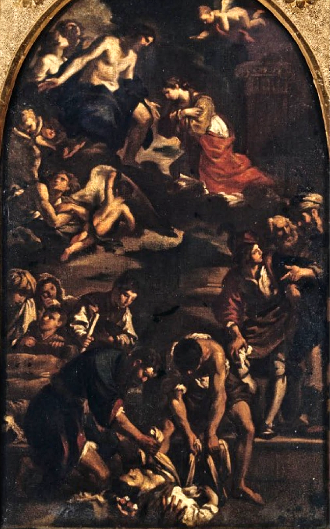 Sepoltura e gloria di santa Petronilla (copia in piccolo formato della grande pala d'altare del Guercino attualmente collocata nei Musei Capitolini) - Olio su tela, cm. 56,5 x 33,5